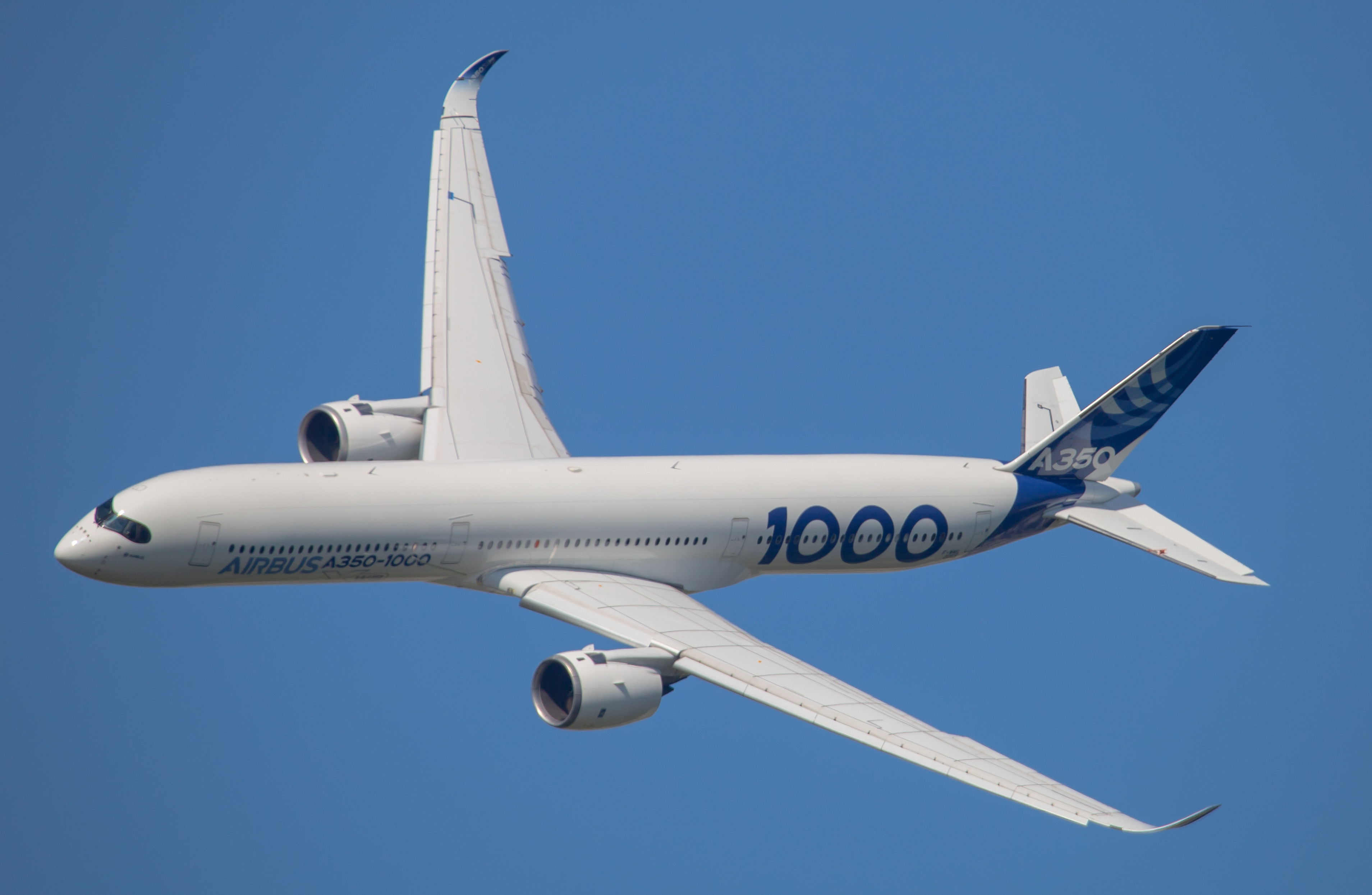 Airbus A350-100